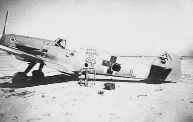 A German Messerschmitt Me 109F fighter for Jagdgeschwader 53 "Pik As" at El Daba, Egypt.